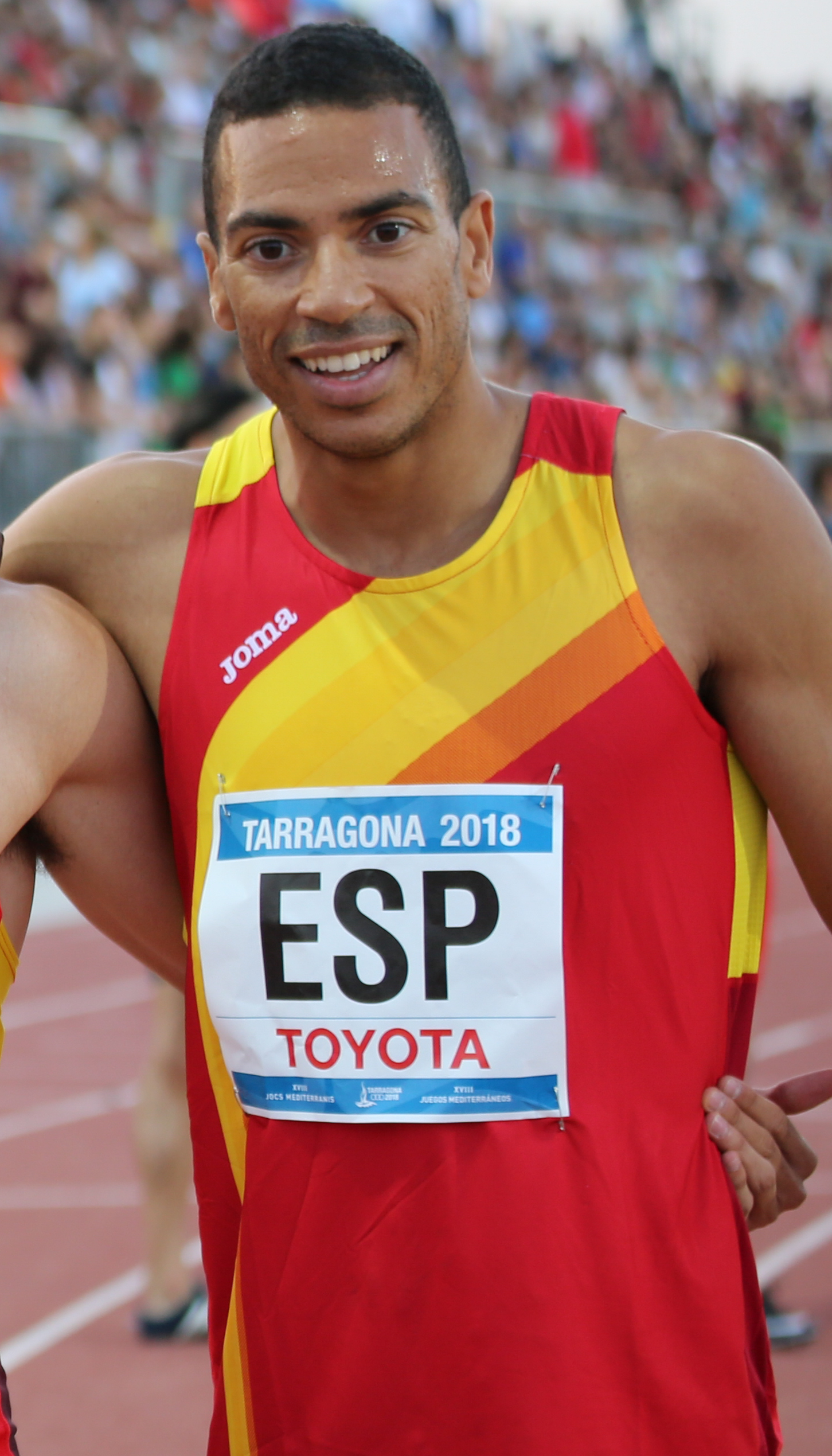 Mark Ujakpor en los relevos 4x400 en los Juegos del Mediterráneo 2018